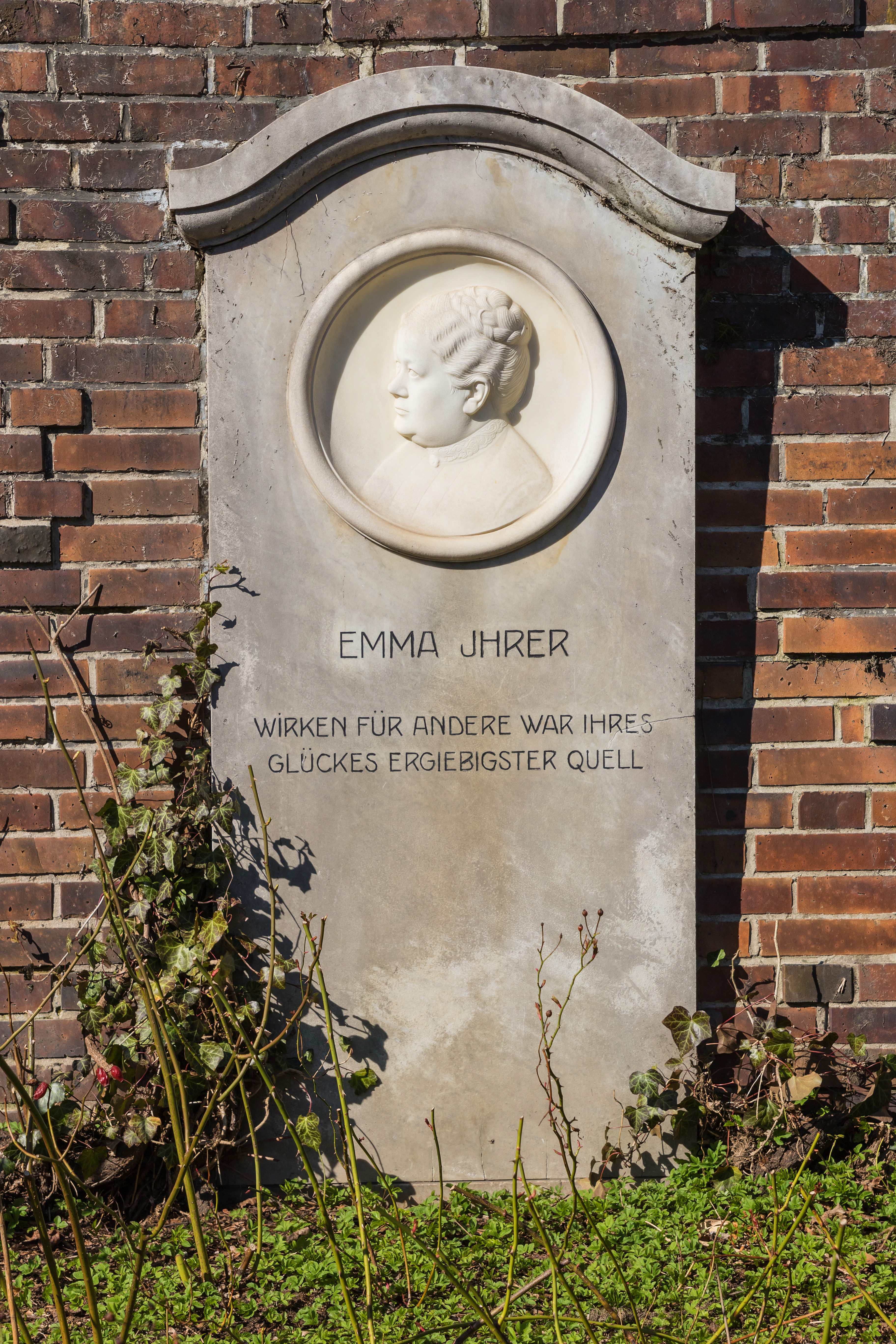 Zentralfriedhof Friedrichsfelde, Berlin-Lichtenberg. Gedenkstätte der Sozialisten, Grab von Emma Ihrer.